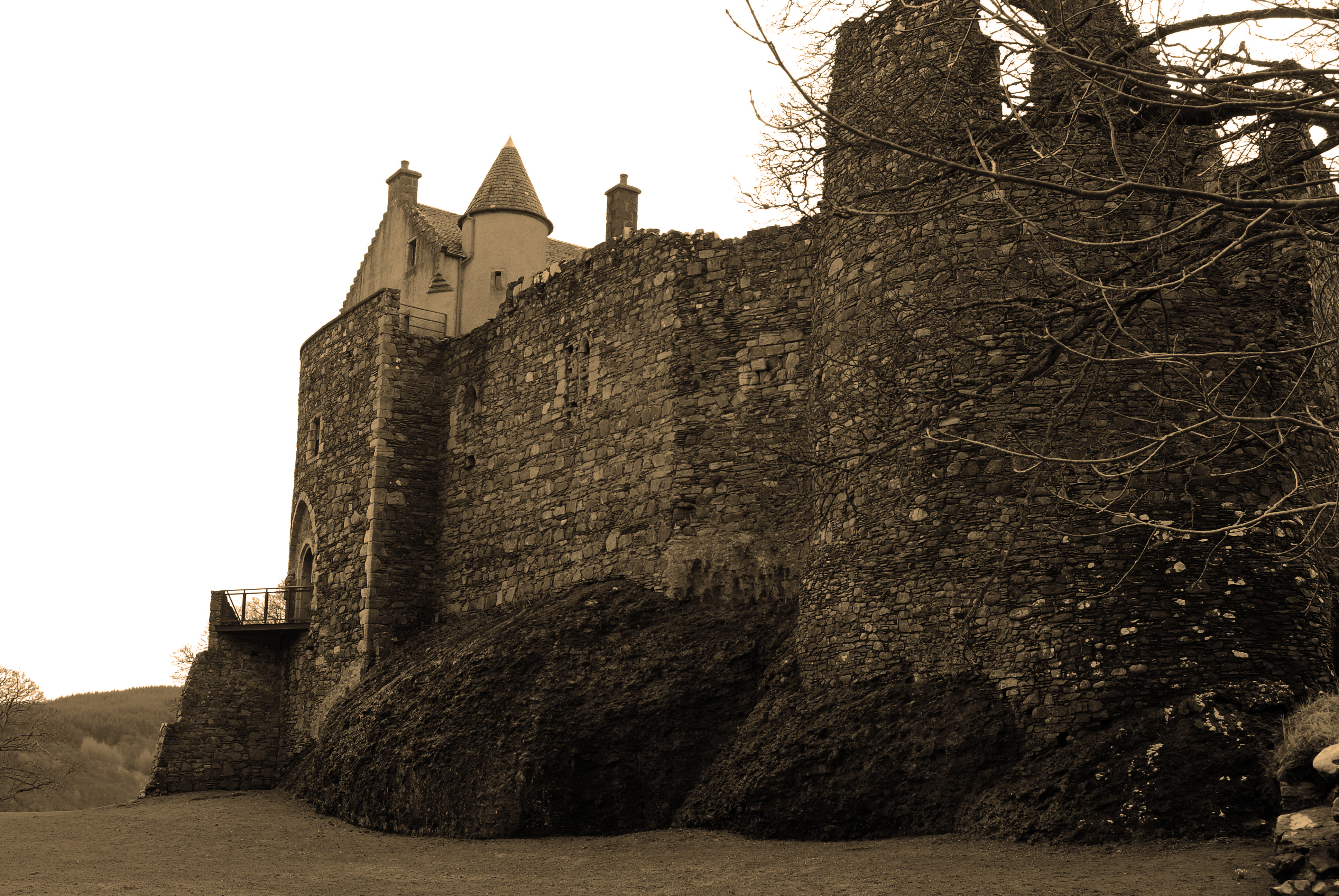 in sepia...Feb 2009